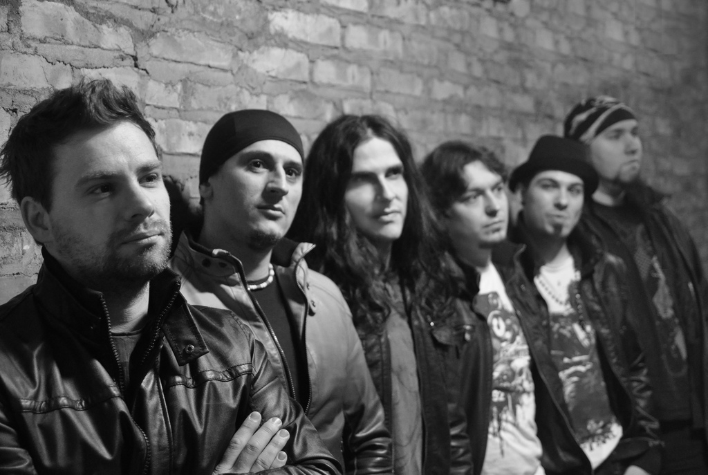 AlogiA 2011